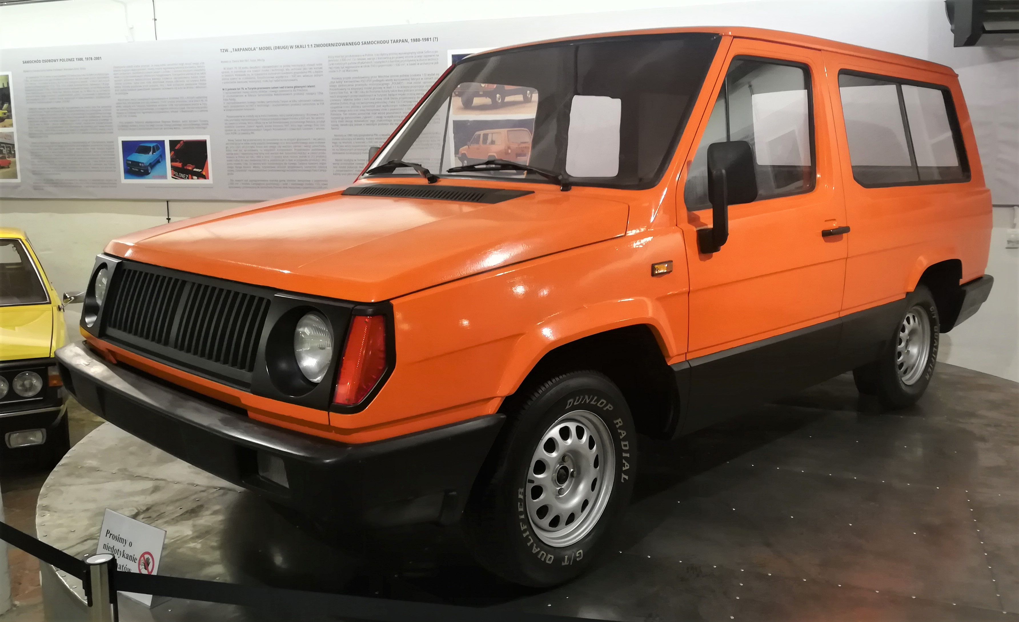 Prototyp - model gipsowy samochodu Tarpaniola. Muzeum Rolnictwa w Szreniawie.